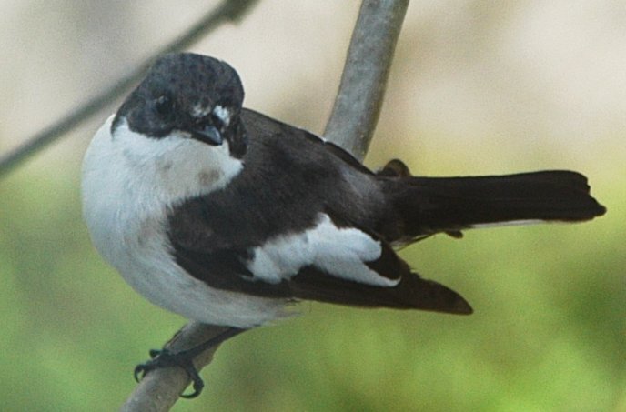 Trauerschnäpper (Ficedula hypoleuca) auf Esche; Uzwil, Schweiz Bearbeitung: Zugeschnitten, Kontrast erhöht (GIMP)